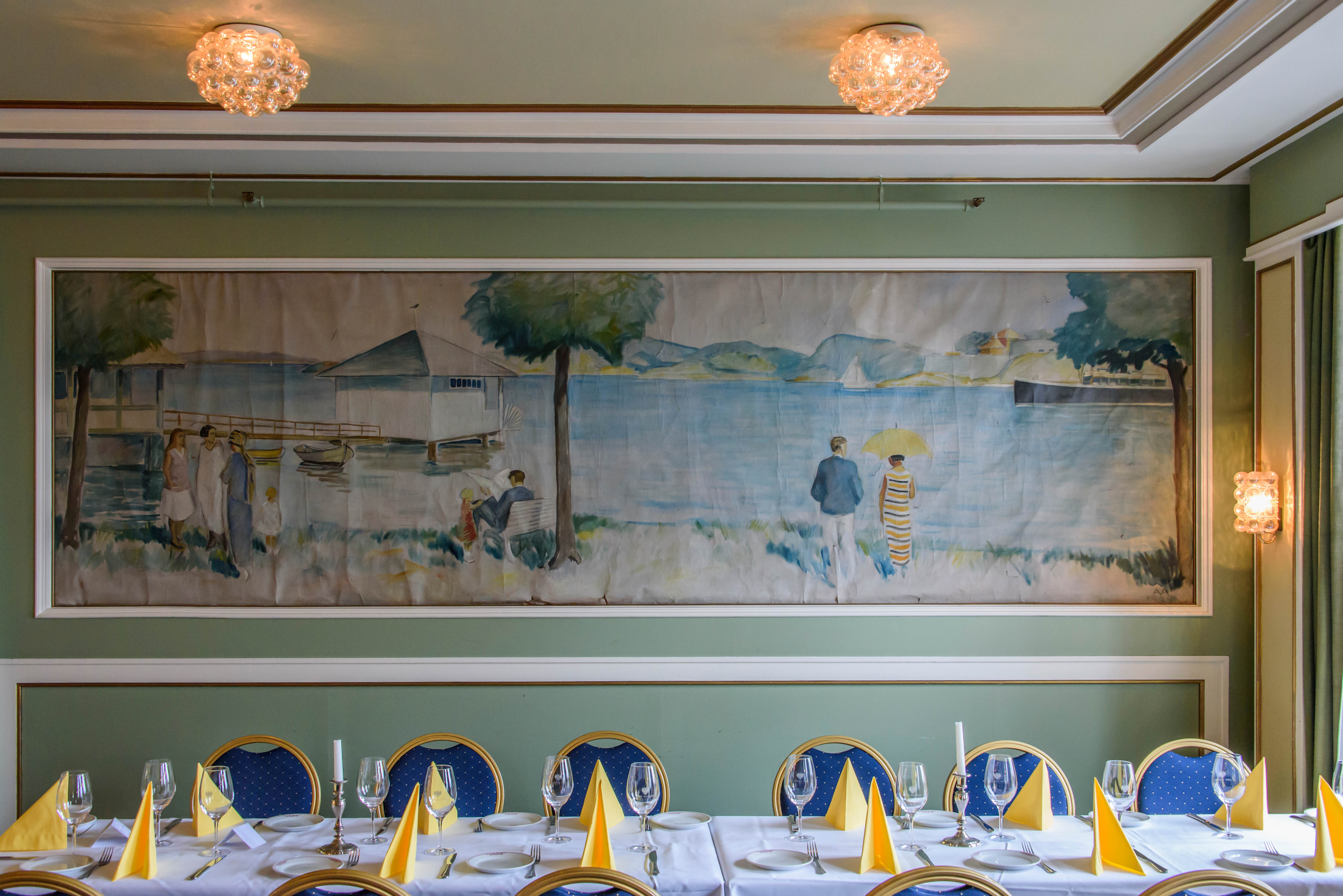 Bilde av Asbjørn Aamodt i Aamodtsalen i Hotell Wassilioff. Til høyre Herman og Gisken Wildenvey